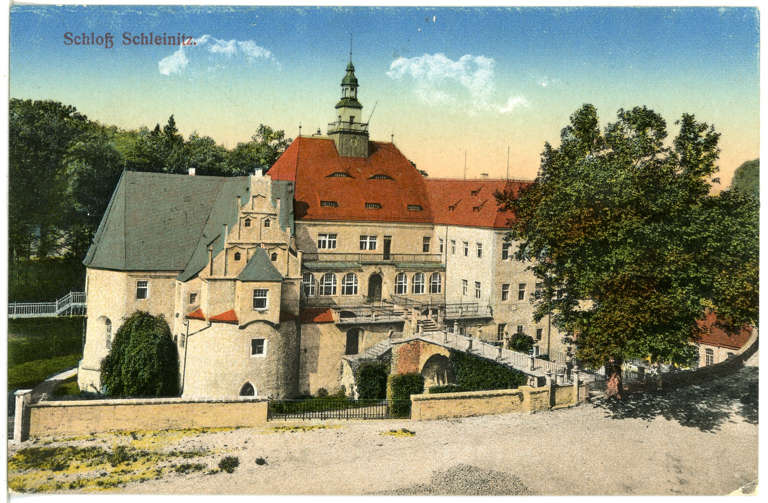 Schleinitz; Schloß This postcard is from publisher Brück & Sohn in Meißen ( postcard has a unique number 20042 and is available in a higher resolution at the publisher. This images was uploaded in a cooperation project between Wikipedians and the publisher.